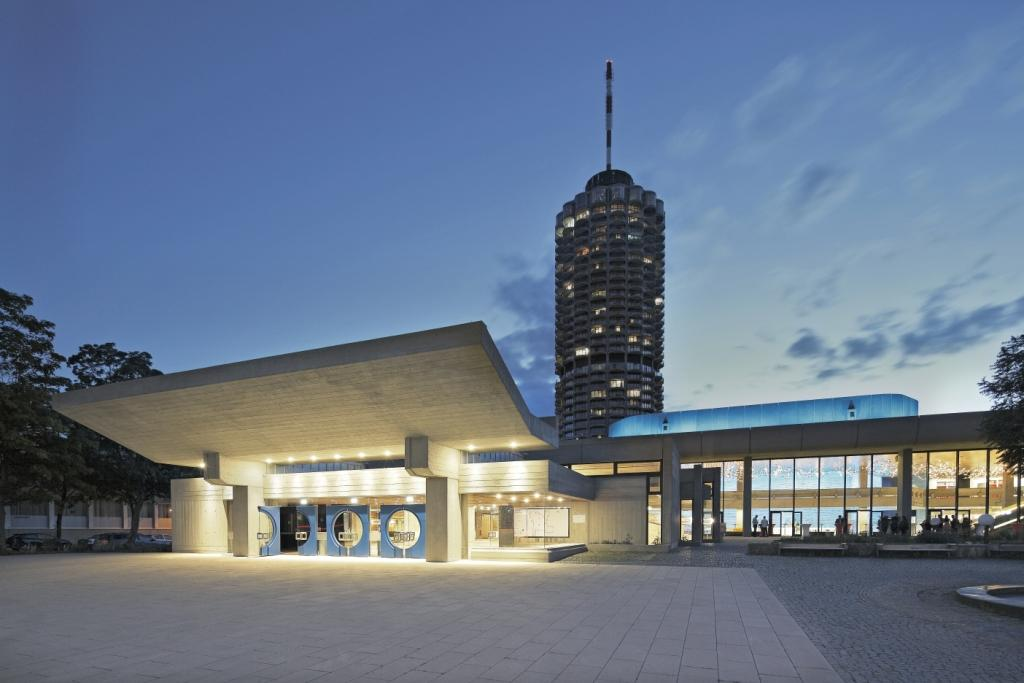 Ursprünglicher Titel: © Kongress am Park N. Liesz IMG 002661